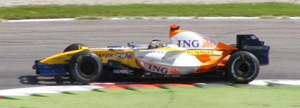 Giancarlo Fisichella at the 2007 Italian GP